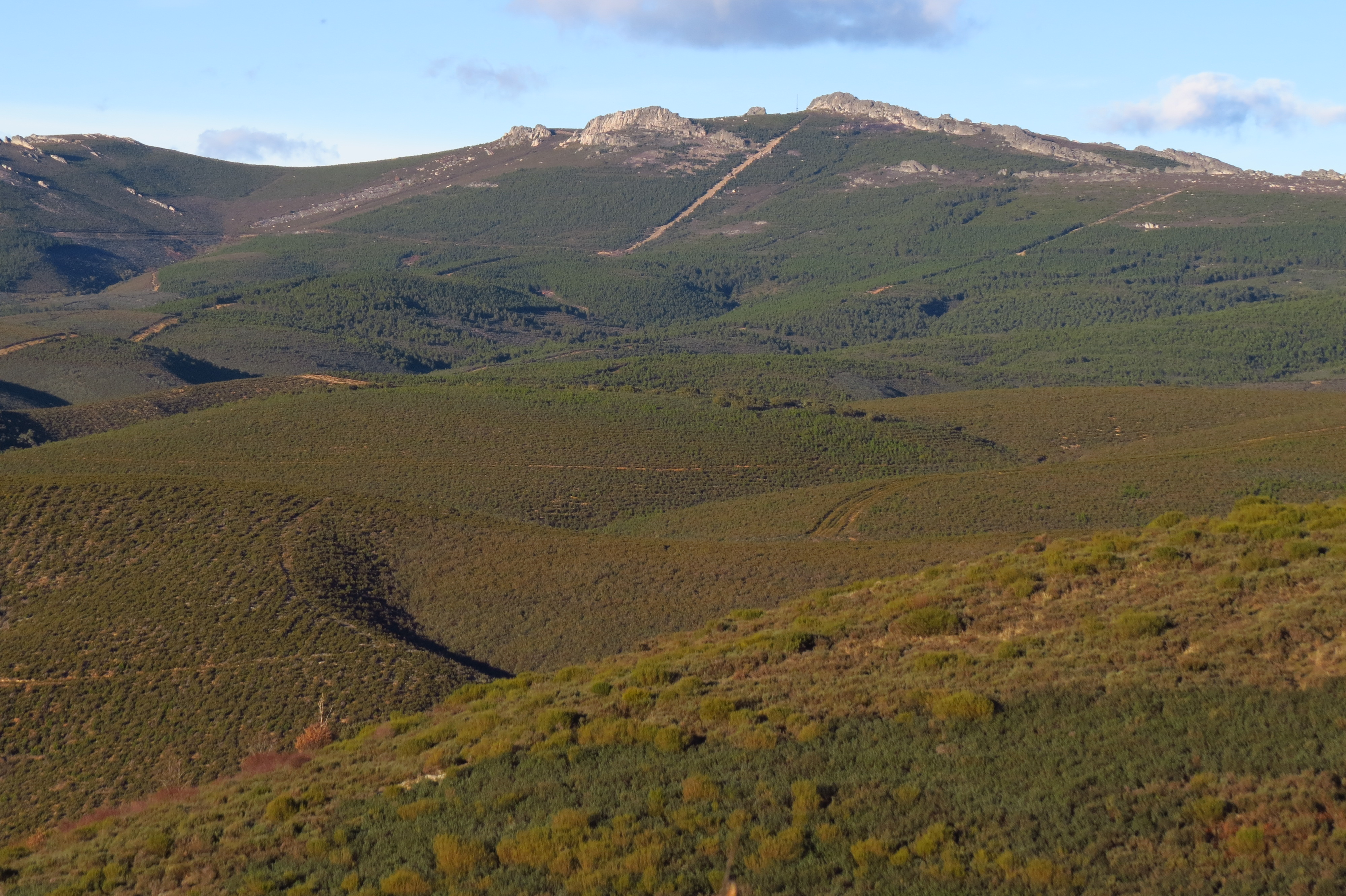 Sierra de la Culebra. This is a photography of a Special Area of Conservation in Spain with the ID: ES4190033. Natura2000 entry, EEA entry